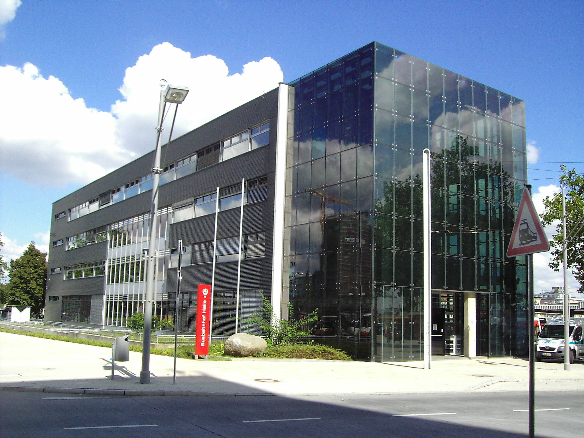 Halle Saale; Gebäude des Eisenbahnbundesamtes, Außenstelle Halle; am Hauptbahnhof, Ernst-Kamieth-Straße 5 (Frühere Gebäudenutzung: Rechenzentrum der Deutschen Reichsbahn, Rbd Halle.)